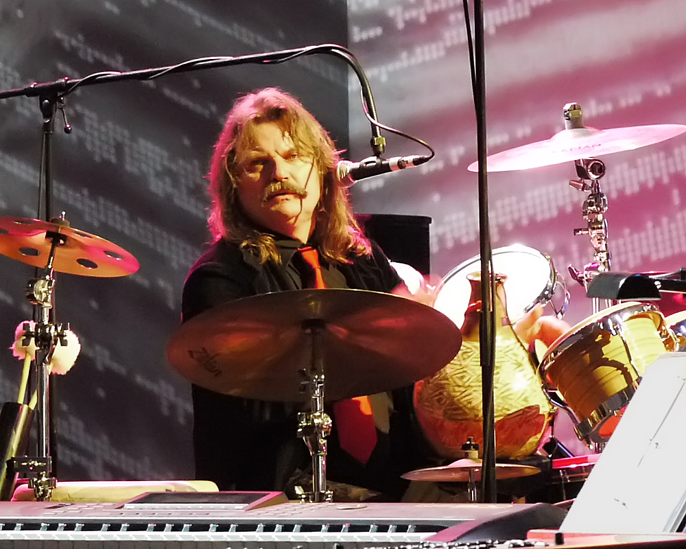 bei einem Live-Auftritt im März 2010.